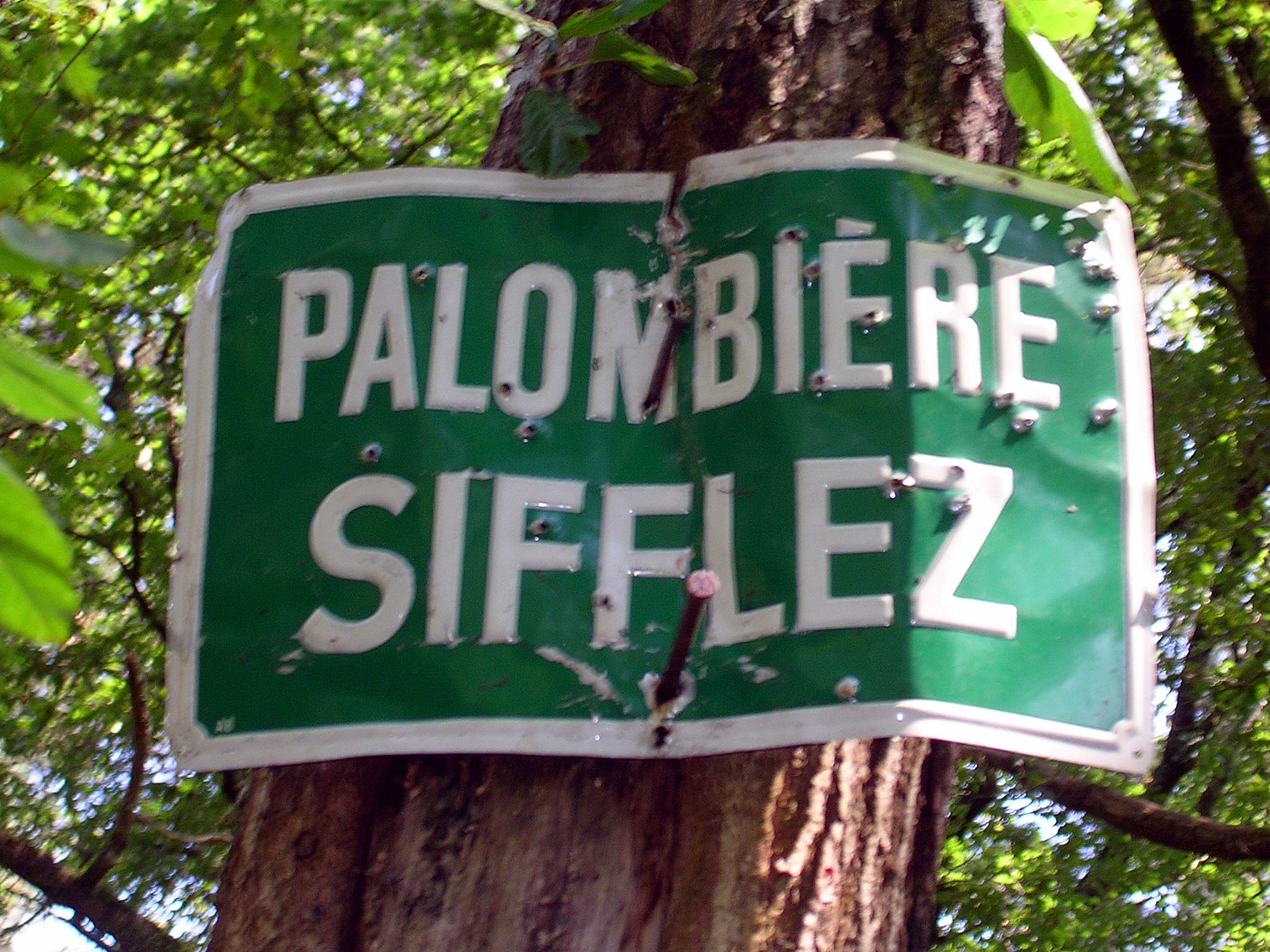 Palombière, panneau d'avertissement (Landes, France). Cette palombière et la forêt ont été entièrement détruites au passage de la tempête Klaus, le 24 janvier 2009.